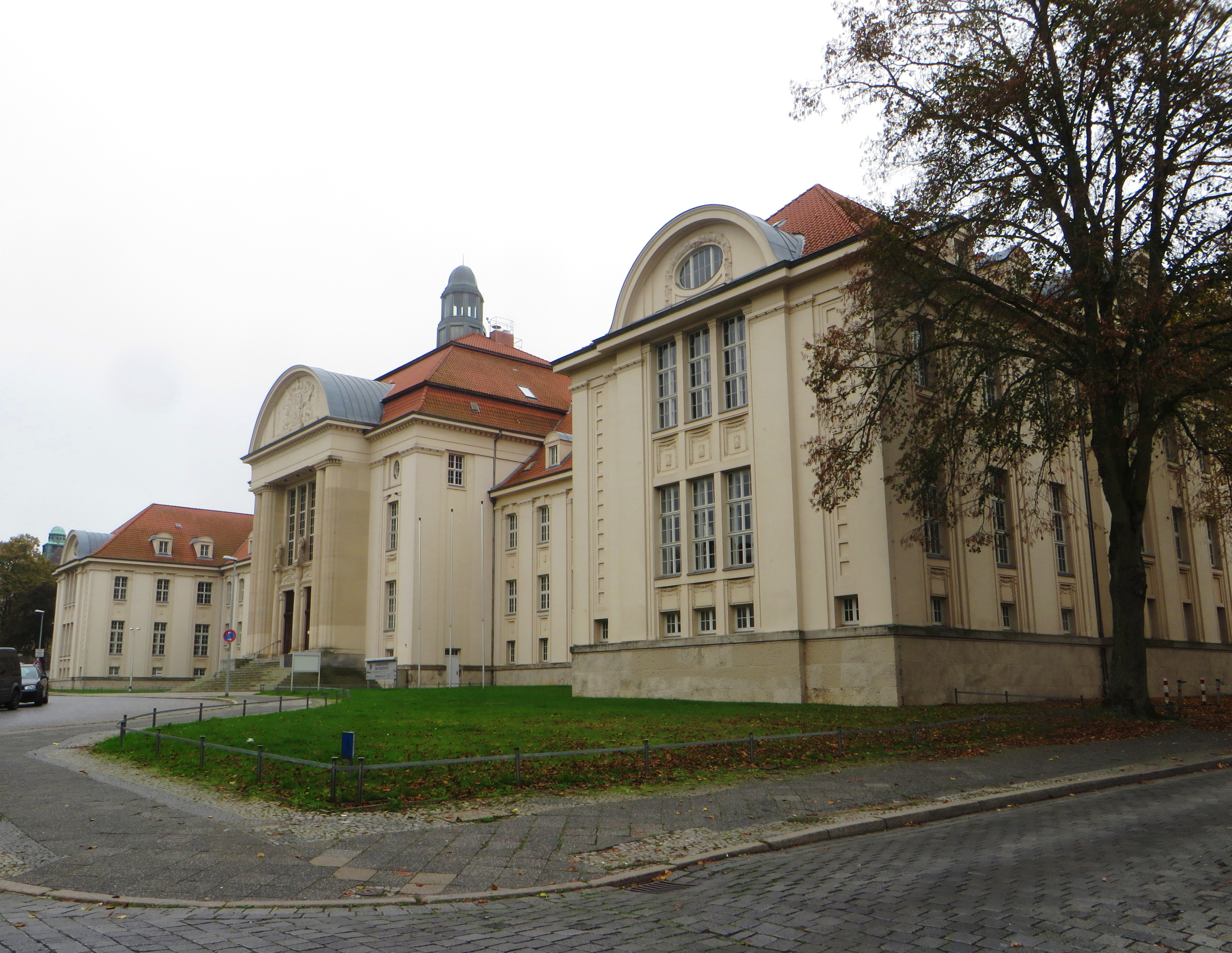 Gebäude des Landgerichtes Schwerin und des Amtsgerichtes Schwerin